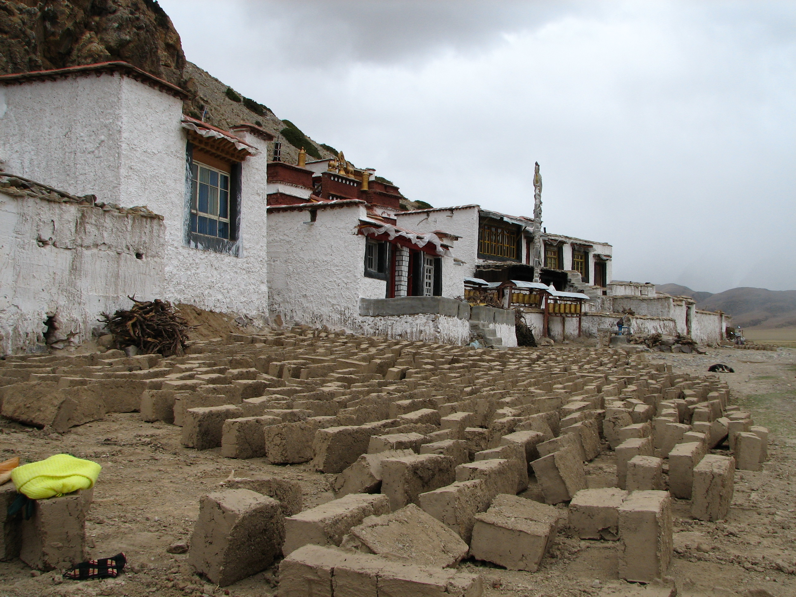 Dorje Ling Nunnery, Yangpachen, Tibet